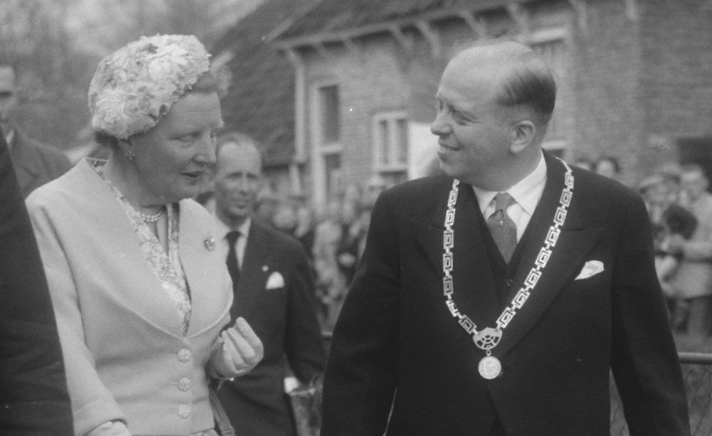 Collectie / Archief : Fotocollectie Anefo Reportage / Serie : [ onbekend ] Beschrijving : Koningin Juliana bezoekt Deventer en Vriezenveen. Bezoek aan boerderij van familie Eshuis [te Vriezenveen?] Datum : 6 mei 1958 Trefwoorden : bezoeken, boerderijen, burgemeesters, koninginnen, koninklijk huis Persoonsnaam : Eshuis, Juliana, koningin Fotograaf : Pot, Harry / Anefo Auteursrechthebbende : Nationaal Archief Materiaalsoort : Negatief (zwart/wit) Nummer archiefinventaris : bekijk toegang 2.24.01.04 Bestanddeelnummer : 909-5424